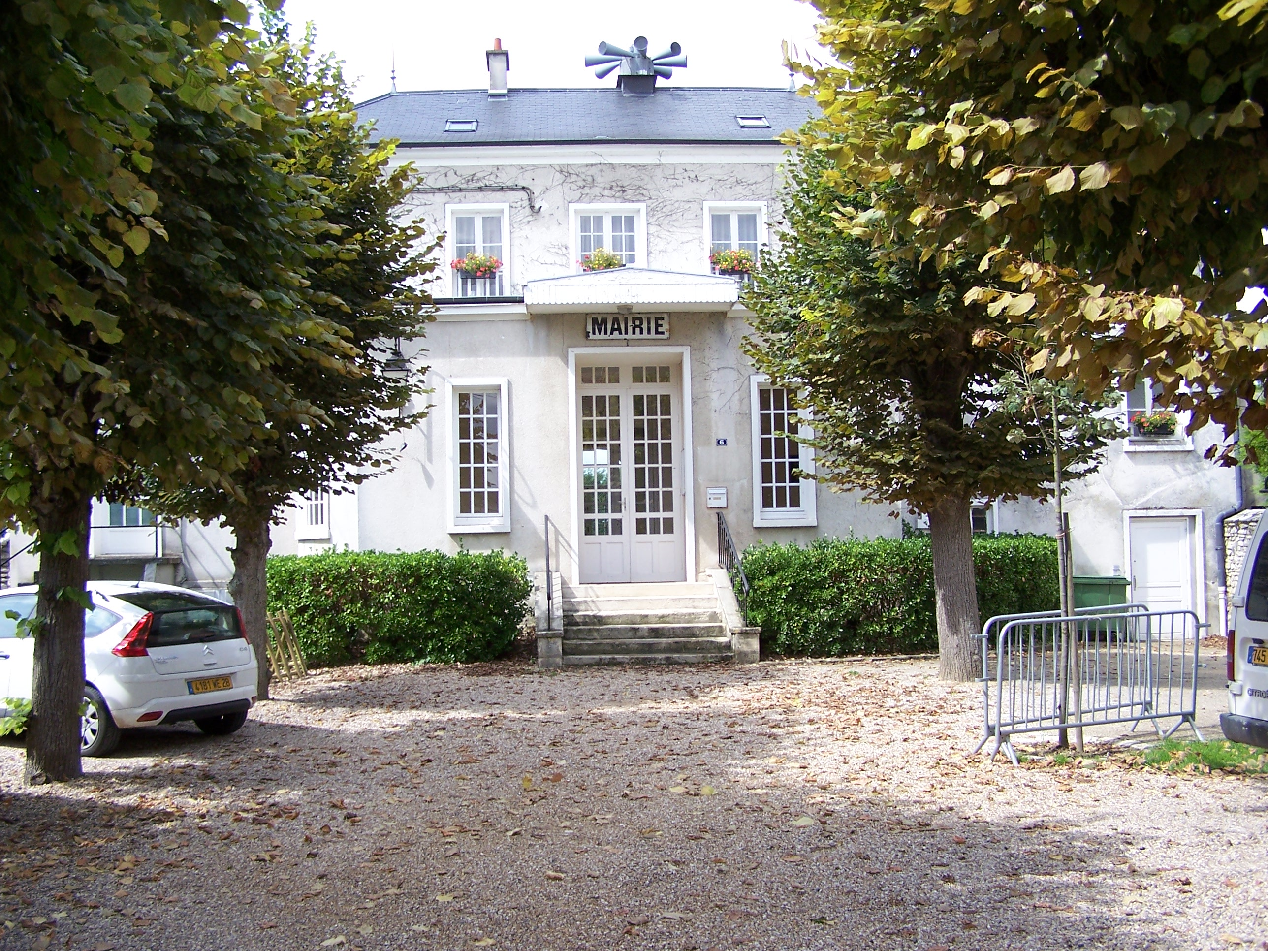 Hôtel de ville de Montainville (Yvelines, France). Photo personnelle. Town hall of Montainville (Yvelines, France). Personal photo. Auteur/Author : ℍenry Salomé